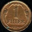 1 fillér (1938) - reverse